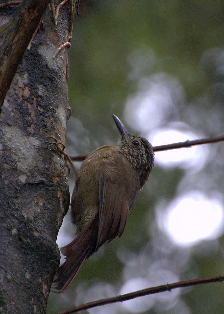 Dendrocolaptes platyrostris Horto Florestal de São Paulo